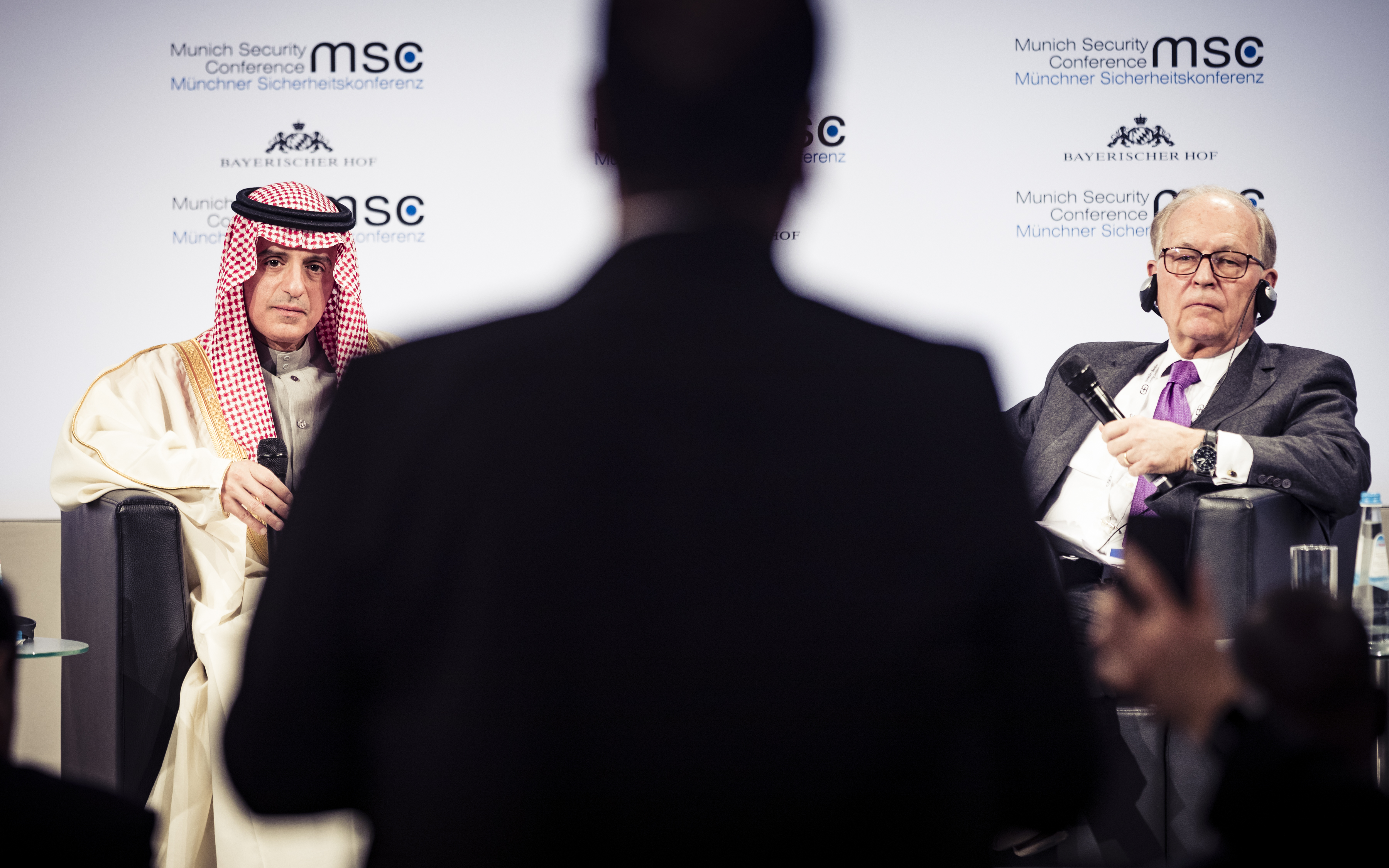 Adel bin Ahmed Al-Jubeir und Wolfgang Ischinger während der Münchener Sicherheitskonferenz 2018